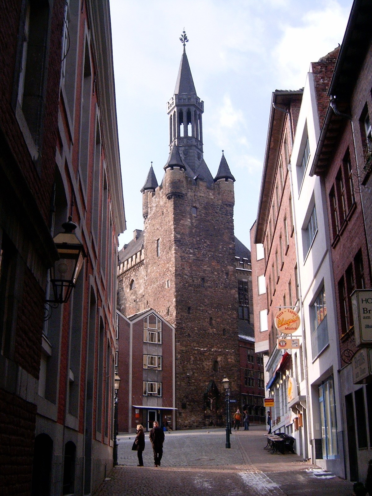 Aken